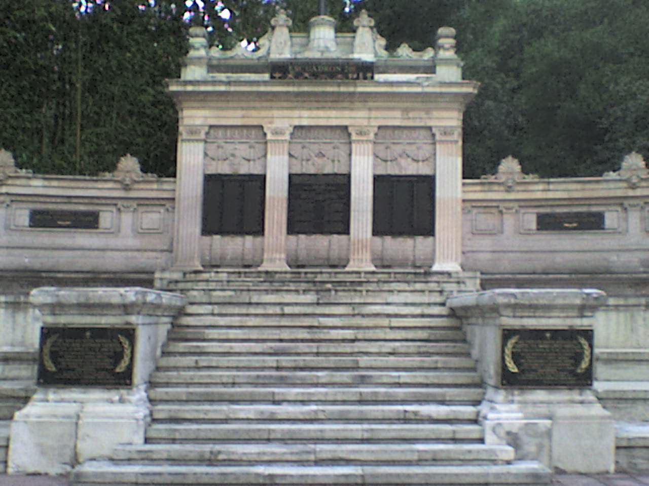 Monumento al Escuadrón 201 y a la Fuerza Aérea Expedicionaria Mexicana que participó en la liberación de Filipinas en 1945.